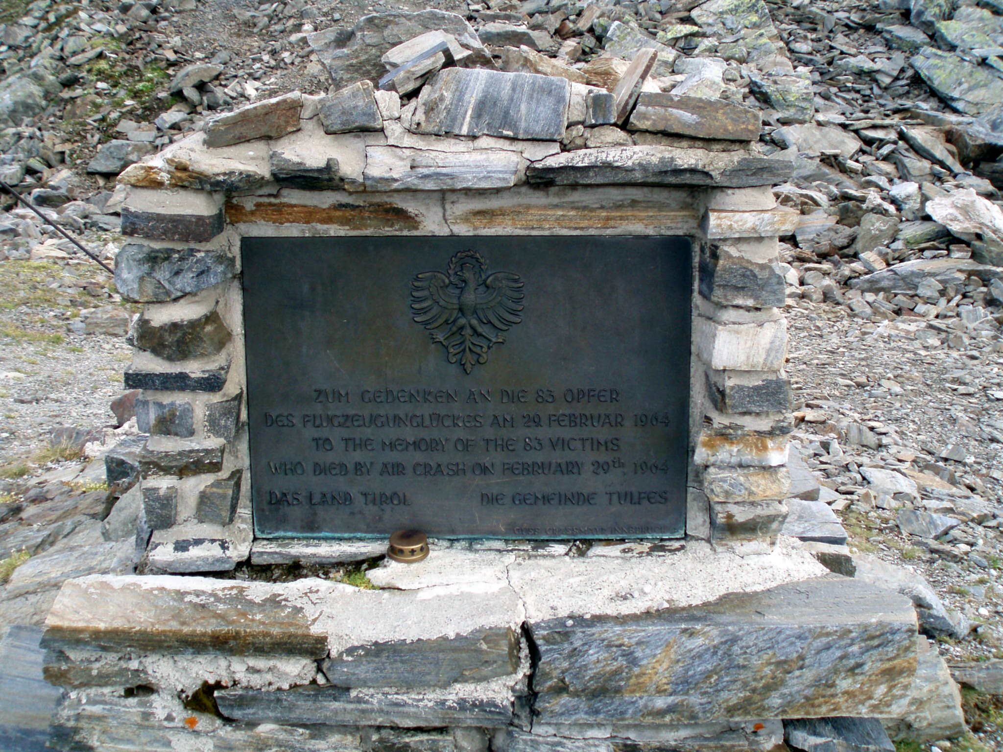 Denkmal an das Flugzeugunglück vom 29. Februar 1964